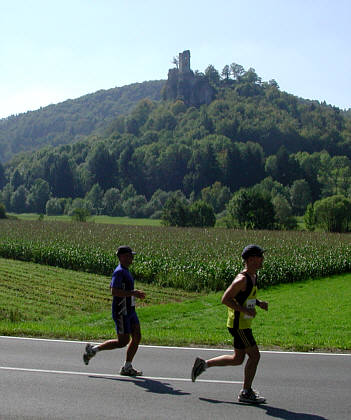 B470 zwischen Streitberg und Muggendorf in der Fränkischen Schweiz beim Fränkische Schweiz-Marathon 2004. Im Hintergrund die Burgruine Neideck.